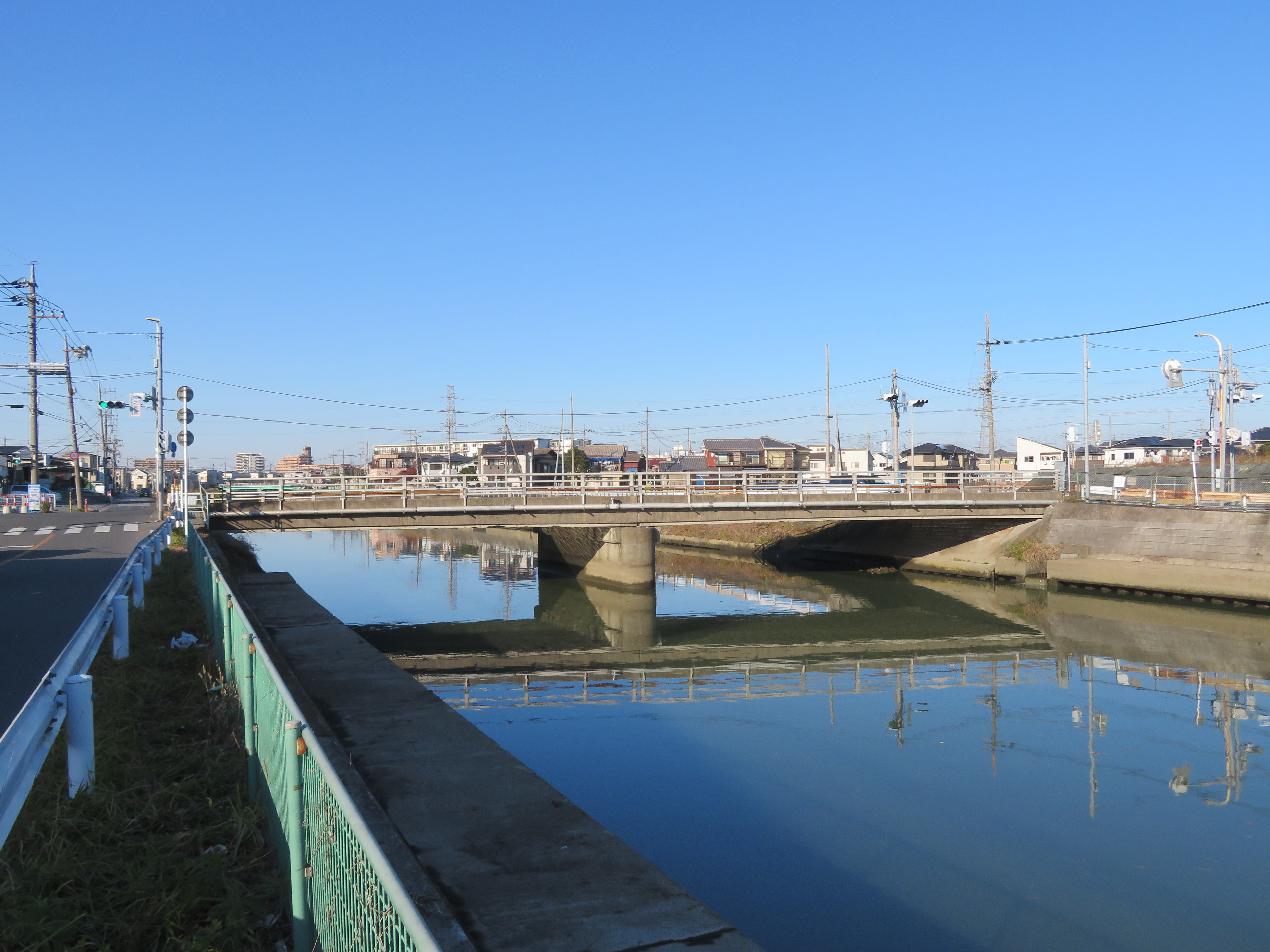 埼玉県八潮市の綾瀬川に架かる柳之宮橋（綾瀬川右岸下流側から撮影） Canon PowerShot SX720 HS